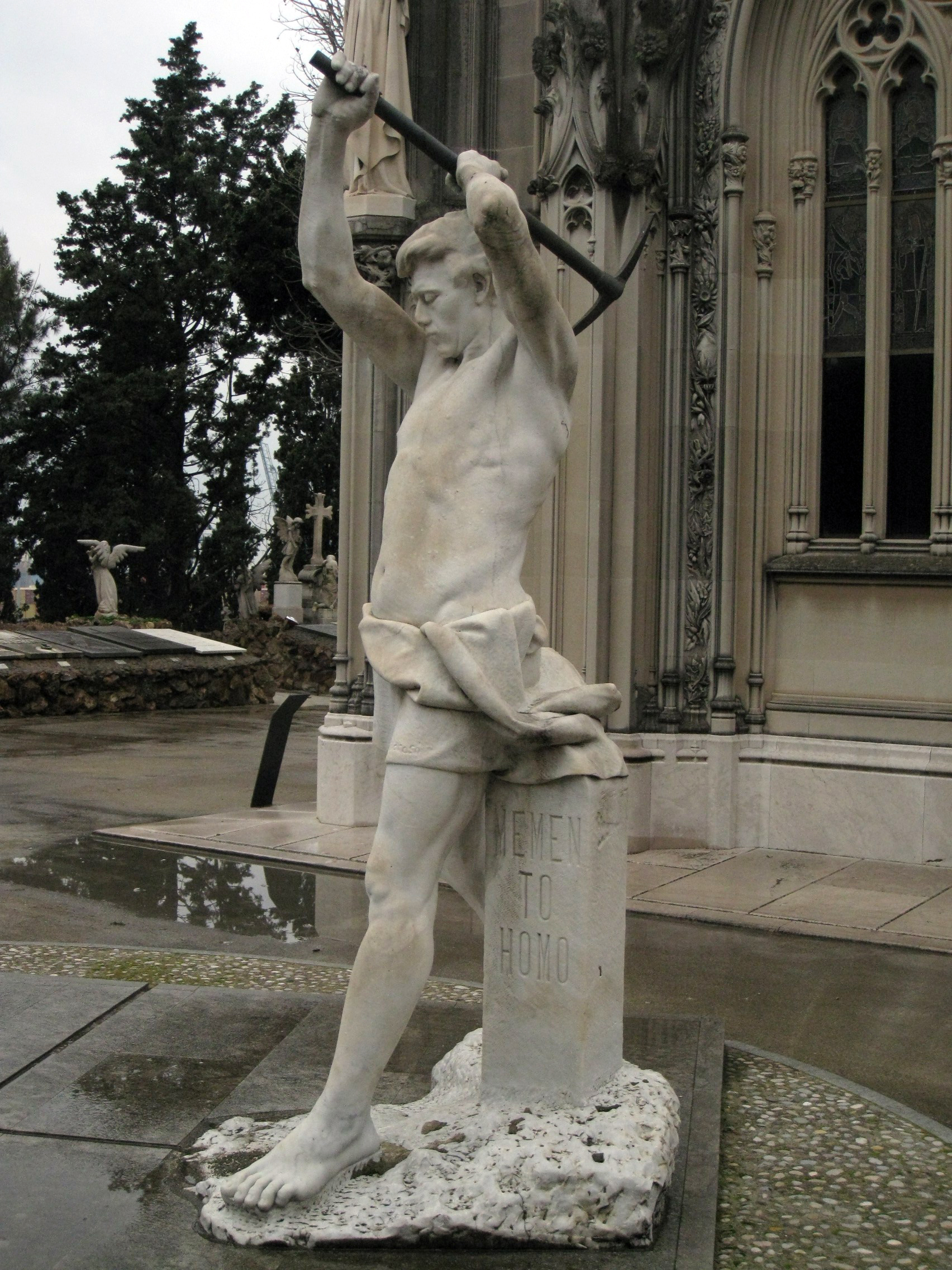 Cementiri de Montjuïc (Barcelona) Object location41° 21′ 12.93″ N, 2° 09′ 17.93″ E